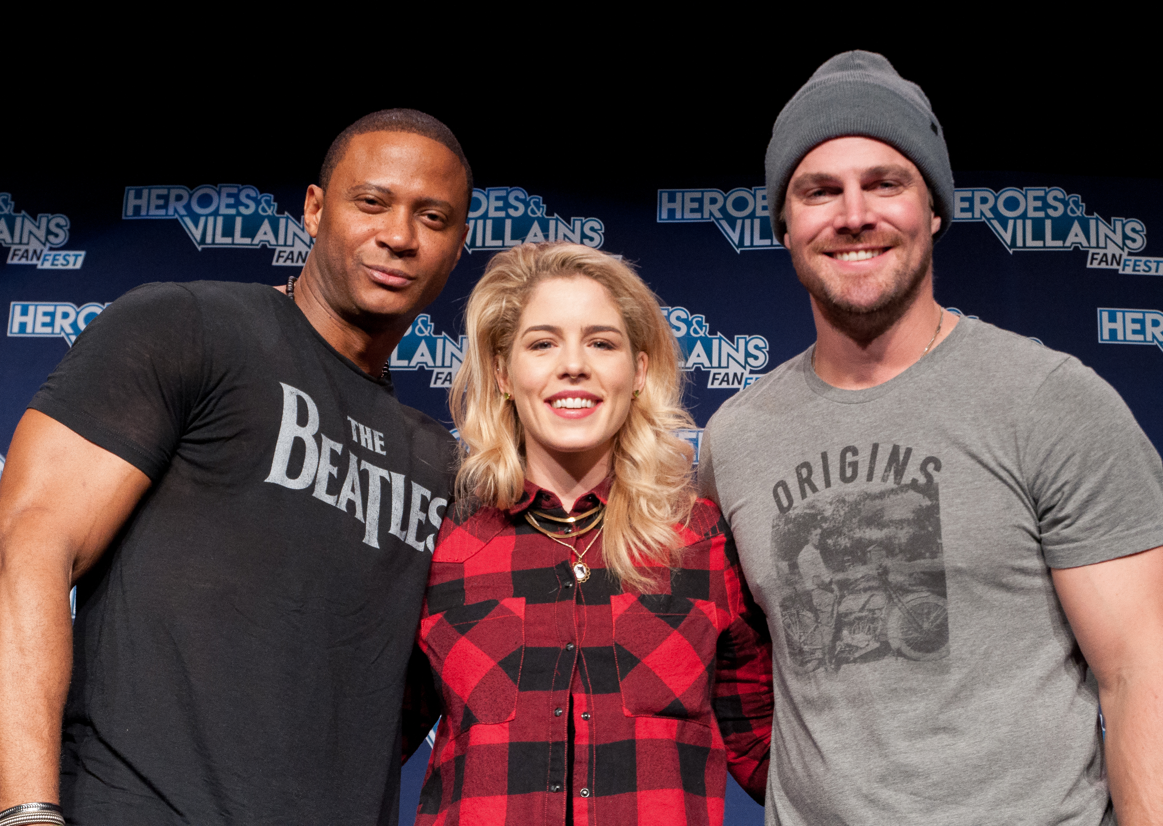 HVFFSJ2017OTA-ALS-187